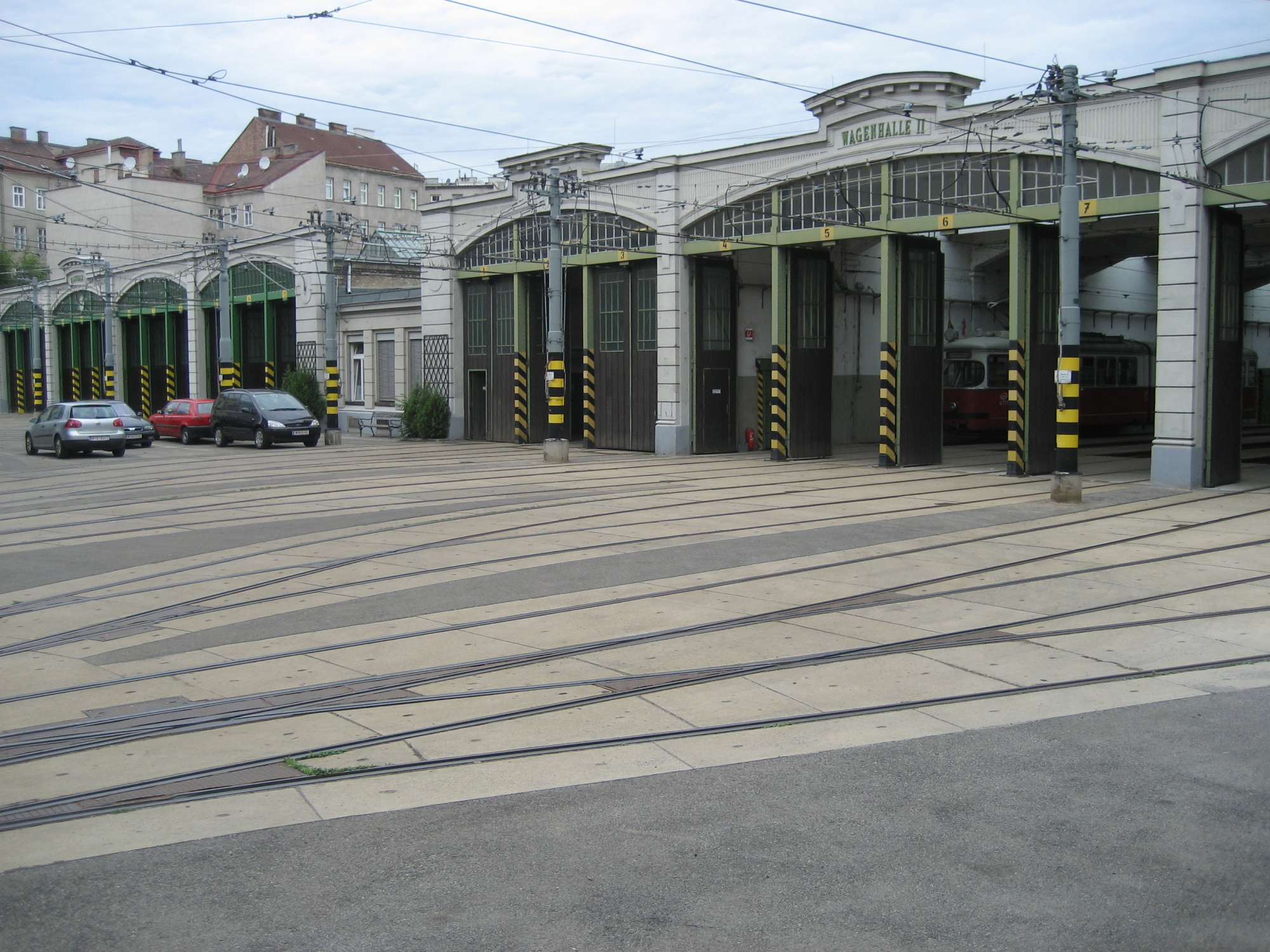 Haus Wexstraße 13-15 in der Brigittenau, in Wien